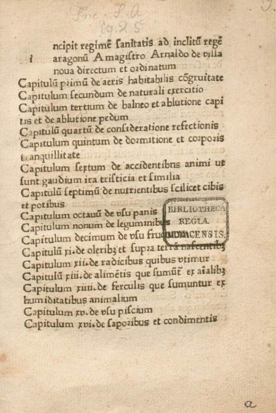 Incipit of Arnaldus de Villa Nova, Regimen sanitatis ad regem Aragonum, 1474